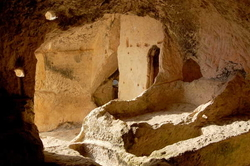 Gobas de Laño y Santorkaria. Iglesia.